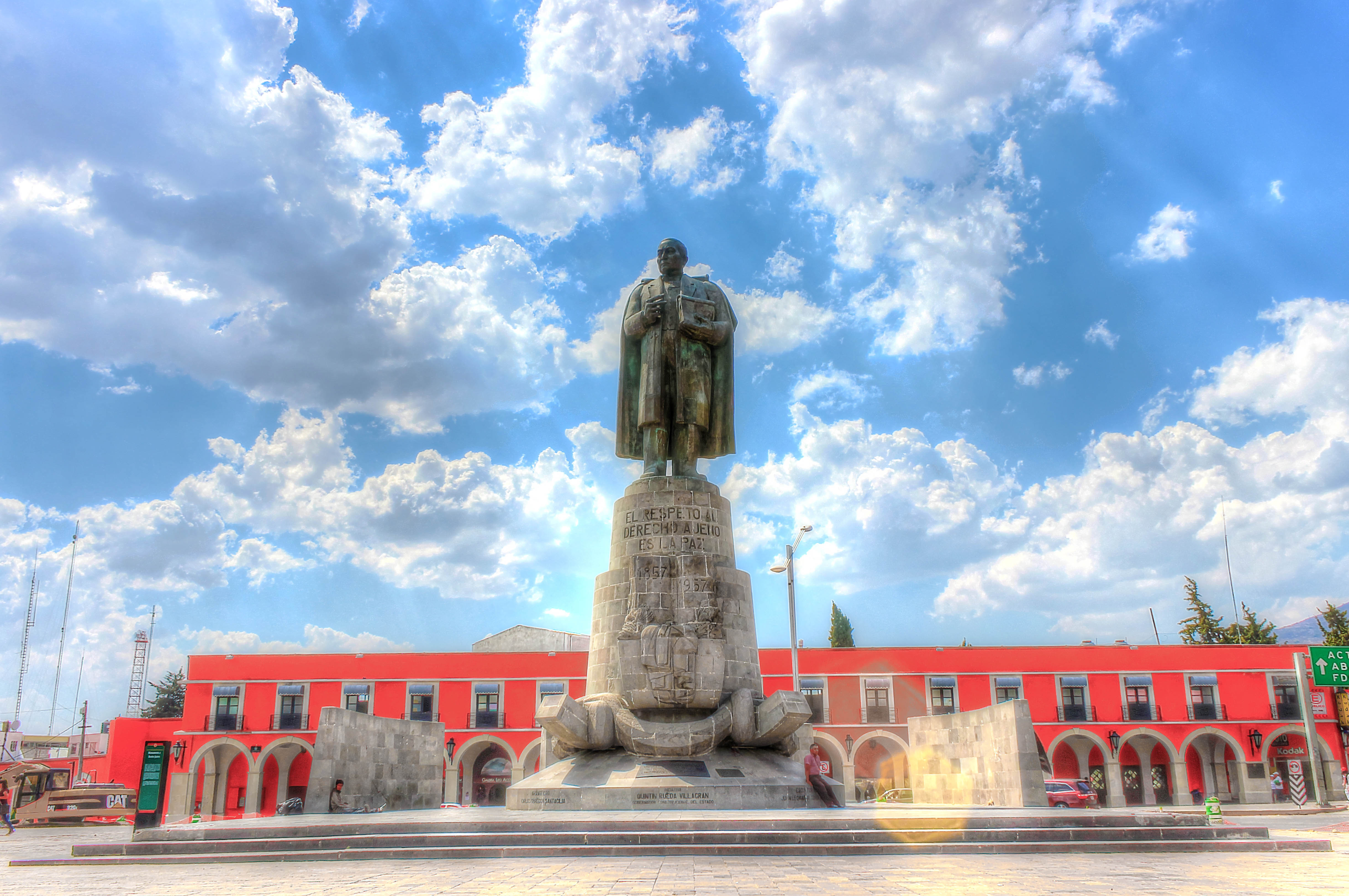 Pachuca de Soto